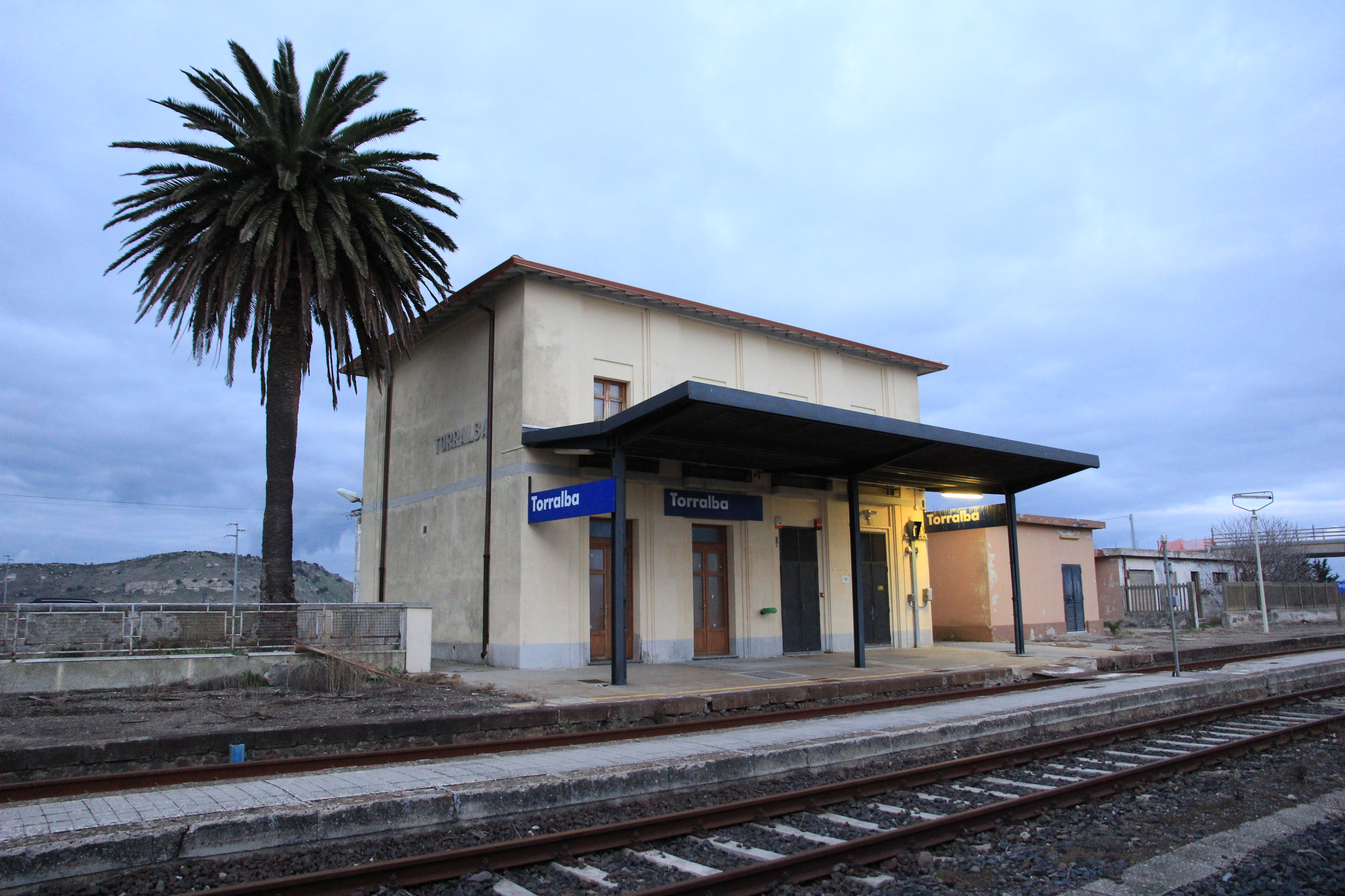 Torralba - Stazione ferroviaria